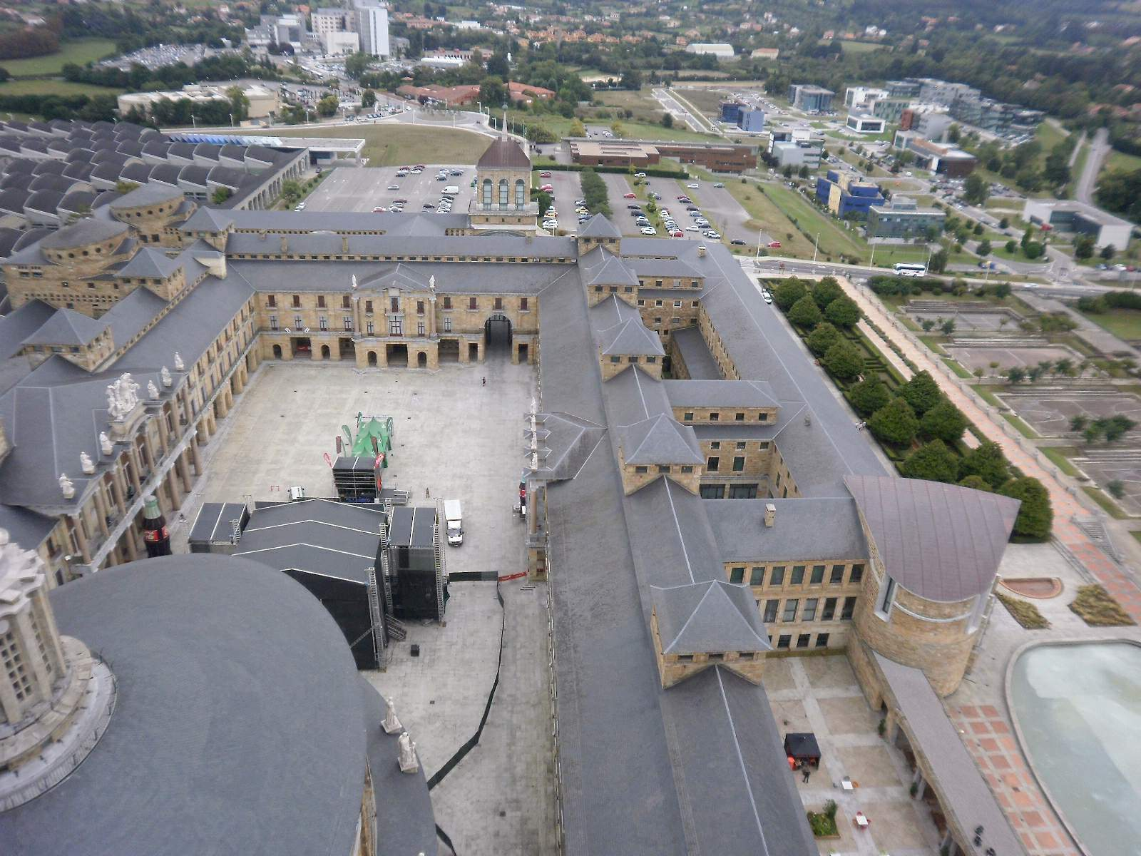 Gijón - Laboral Ciudad de la Cultura (ex Universidad Laboral), vista desde la torre